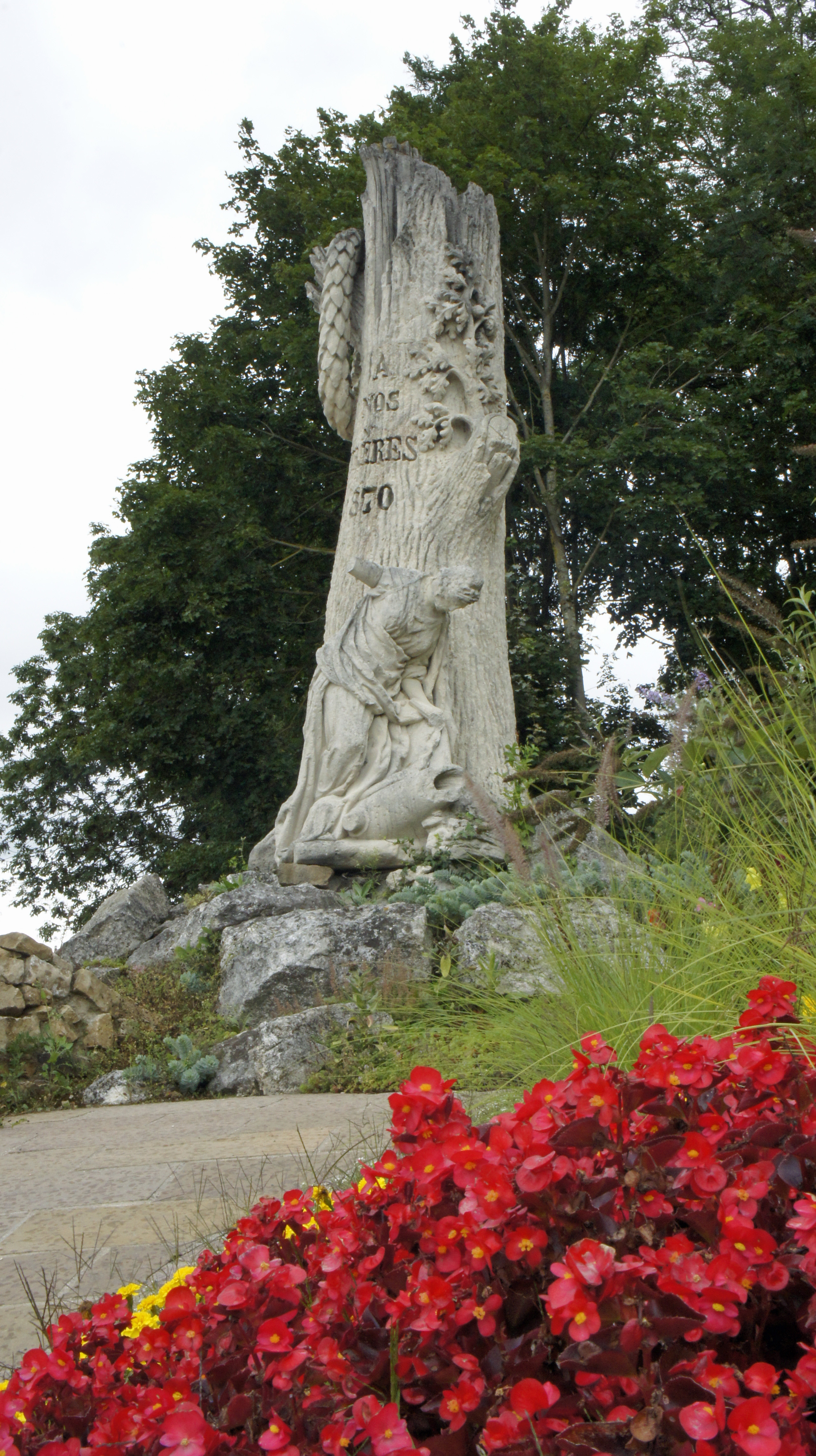 Monument aux morts de la guerre franco-prussienne de 1870 à Floing, bataille de Sedan.